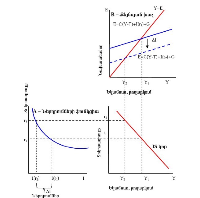 IS կորի կառուցումը ներդրումնների ու քեյնսյան խաչի օգնությամբ